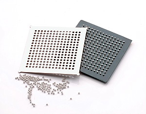 Reballing Maske